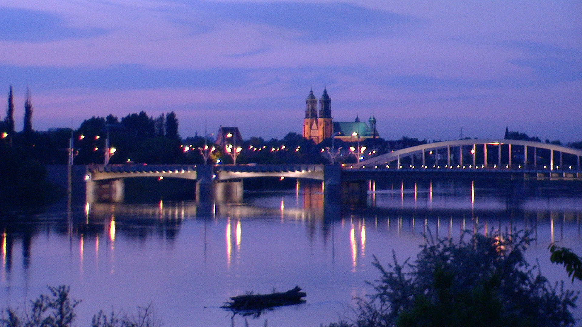 Widok z mostu Królowej Jadwigi w Poznaniu przy bardzo wysokim stanie wody na Warcie w dn. 29.05.2010 r.